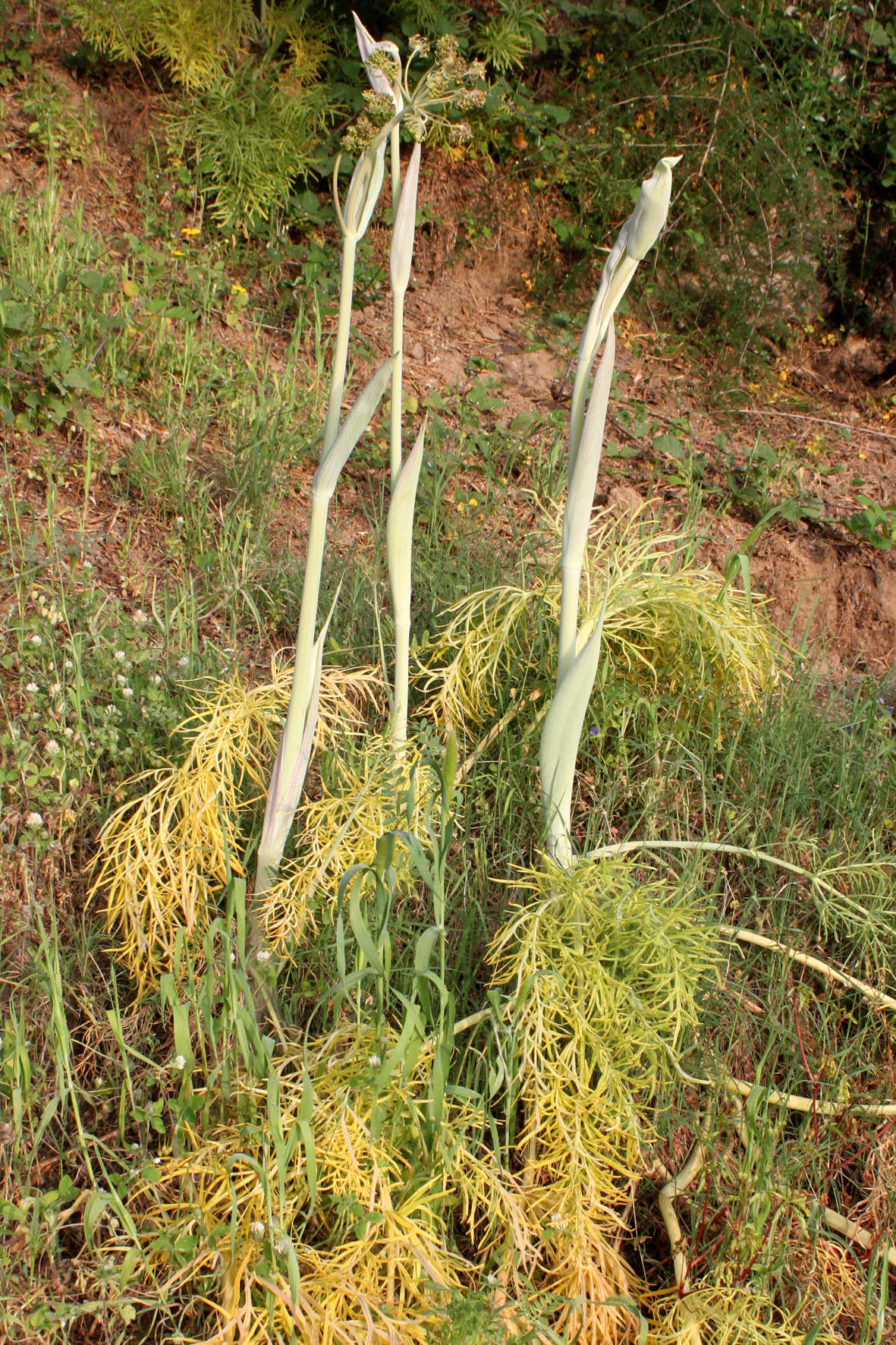 Taqbaylit: Photo prise en Kabylie par Saïd Zidat